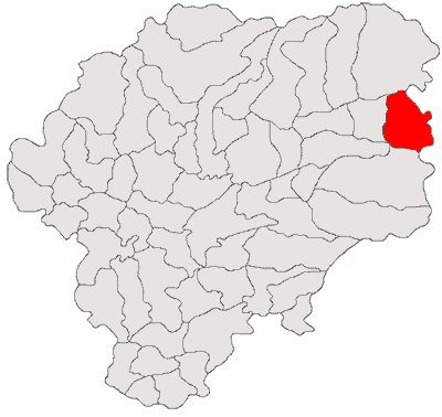 Categorie:Hărţi ale judeţului Bistriţa-Năsăud